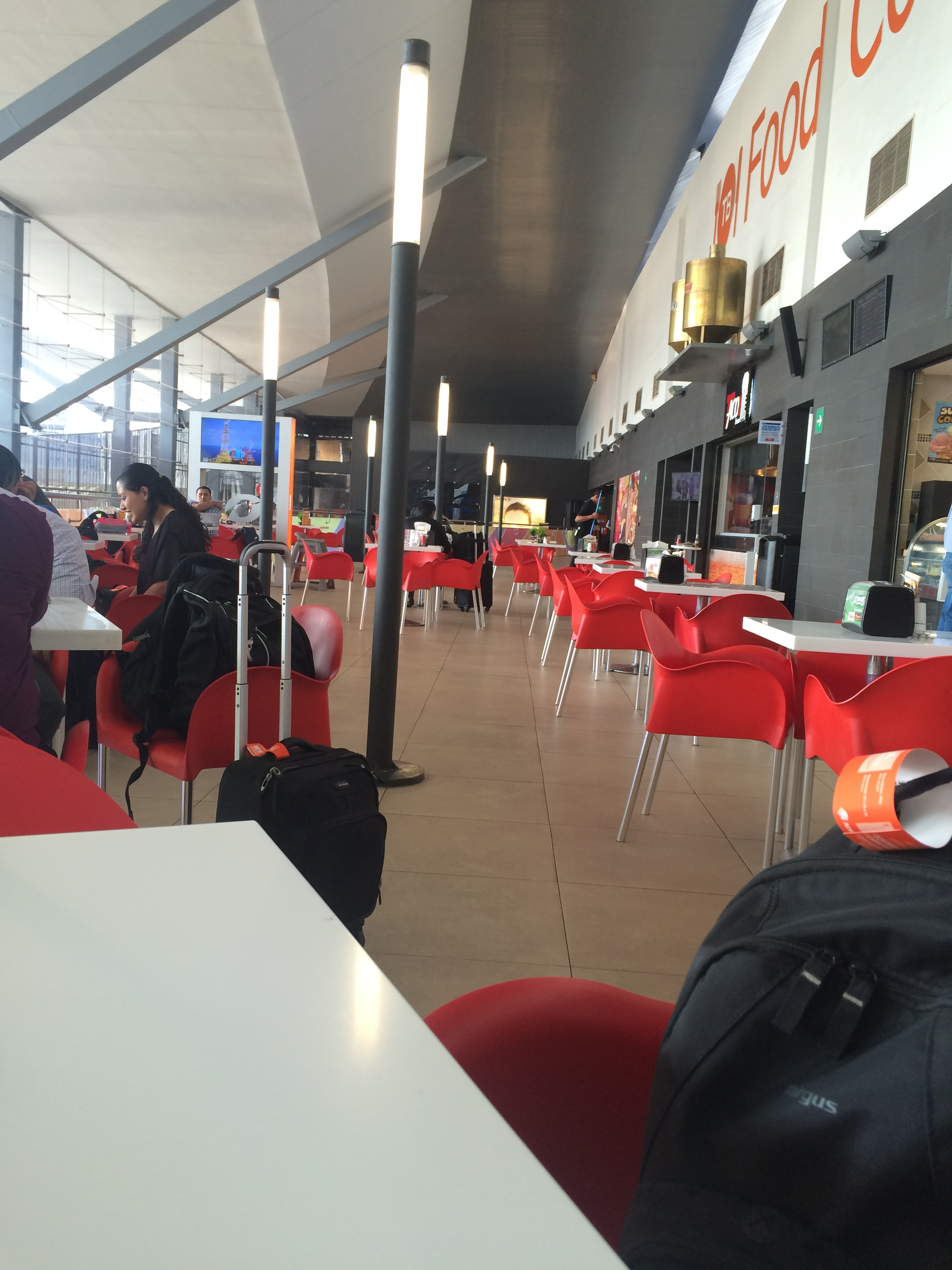 Fast Food de la Terminal B del Aeropuerto Internacional de Monterrey.